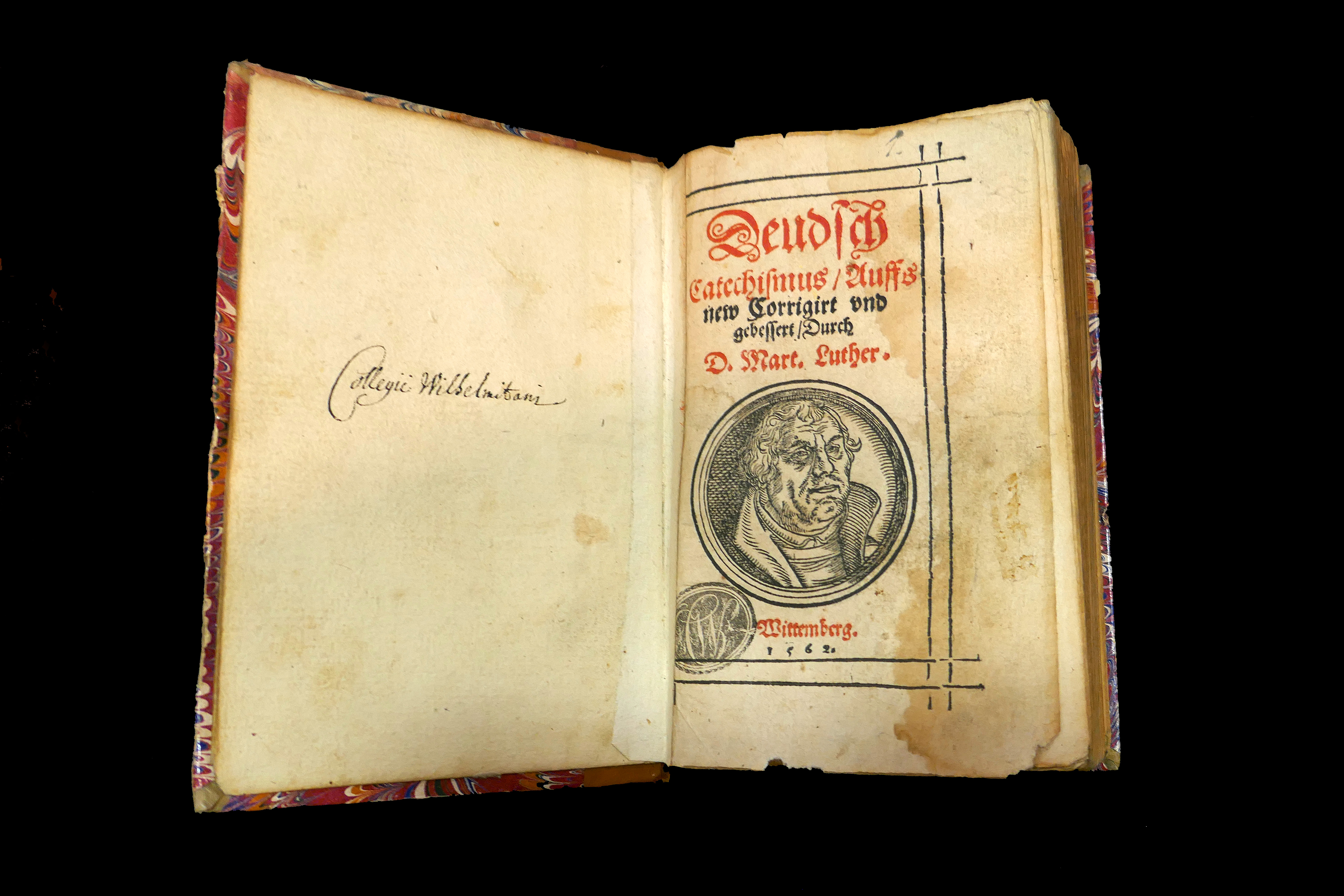 Deudsch Catechismus. Auffs new corrigirt Durch D.Mart. Luther, Wittemberg, 1562 Médiathèque protestante de Strasbourg